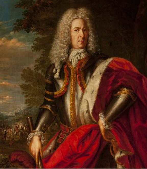 1ste Hertog van Ursel